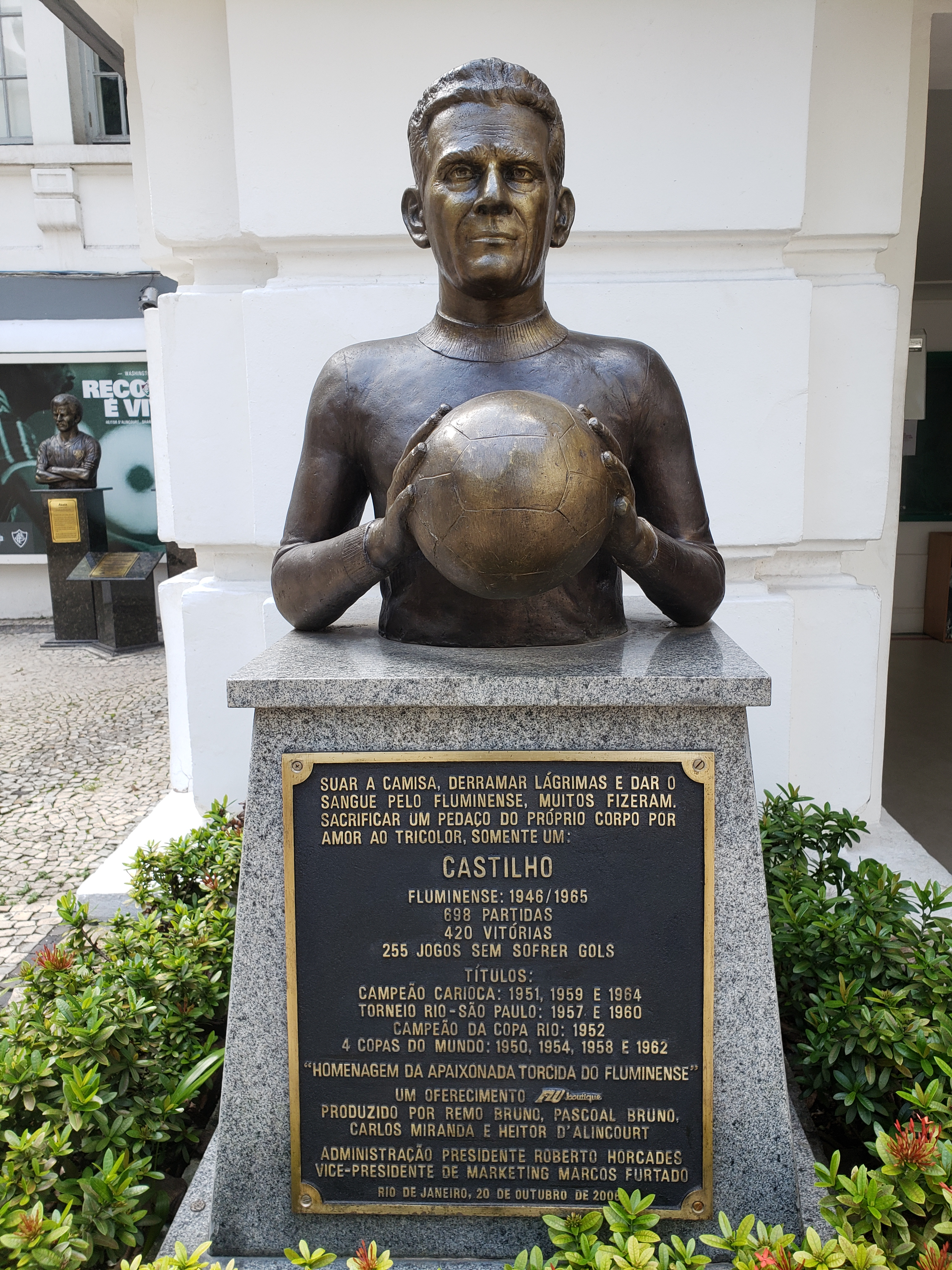 Busto do goleiro Castilho no Fluminense Football Club.